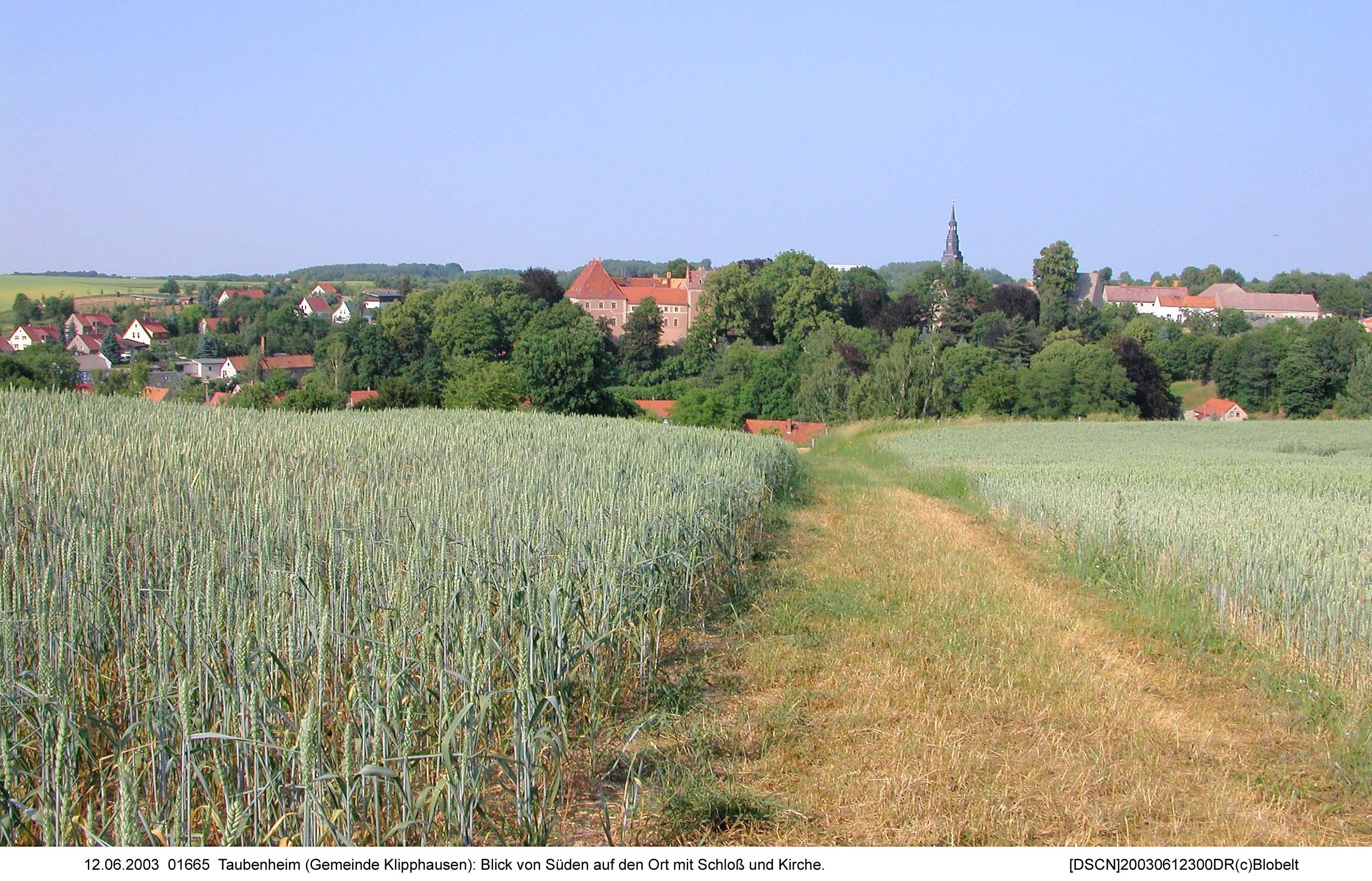 Taubenheim von Süden mit Schloss und Kirche.